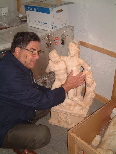 الدكتور فضل لاقوريني مع تمثال مسروق قام بإستعادته